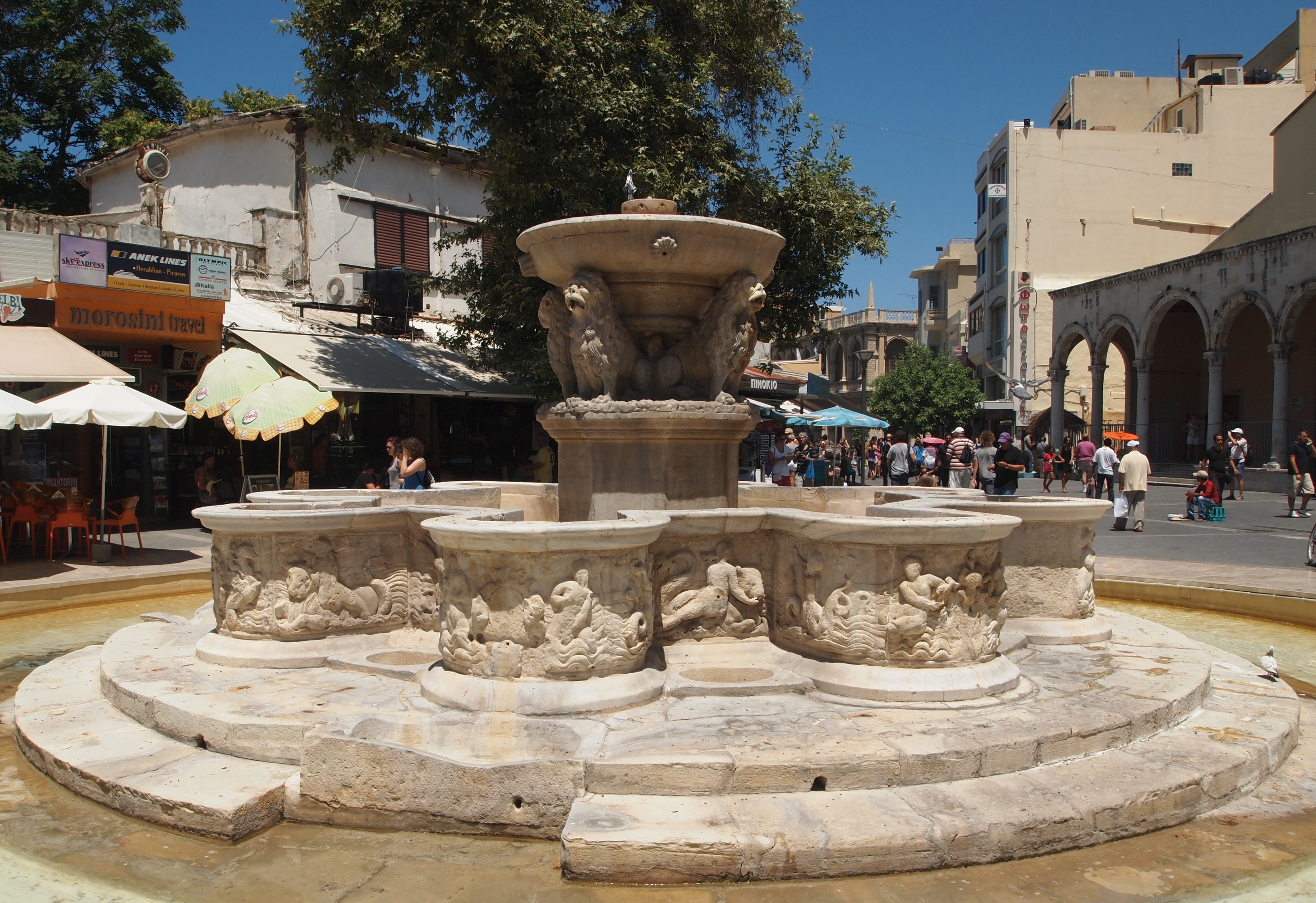 De Morozini fontein in Heraklion (Iraklio)